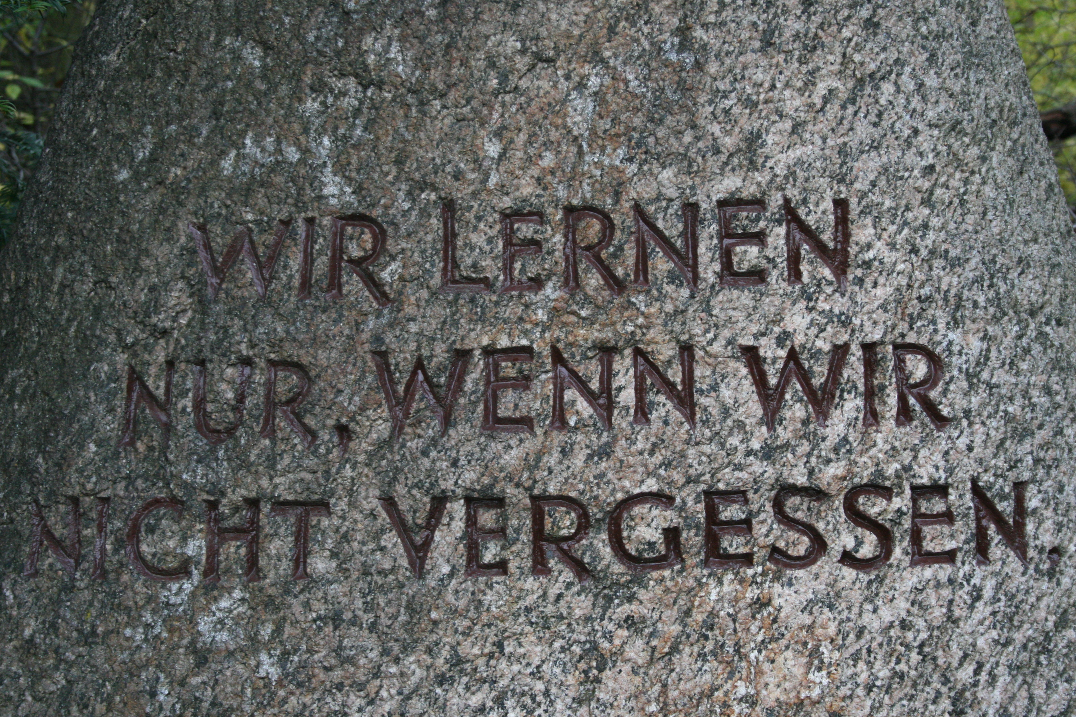 KZ-Gedenkstätte Schandelah-Wohld